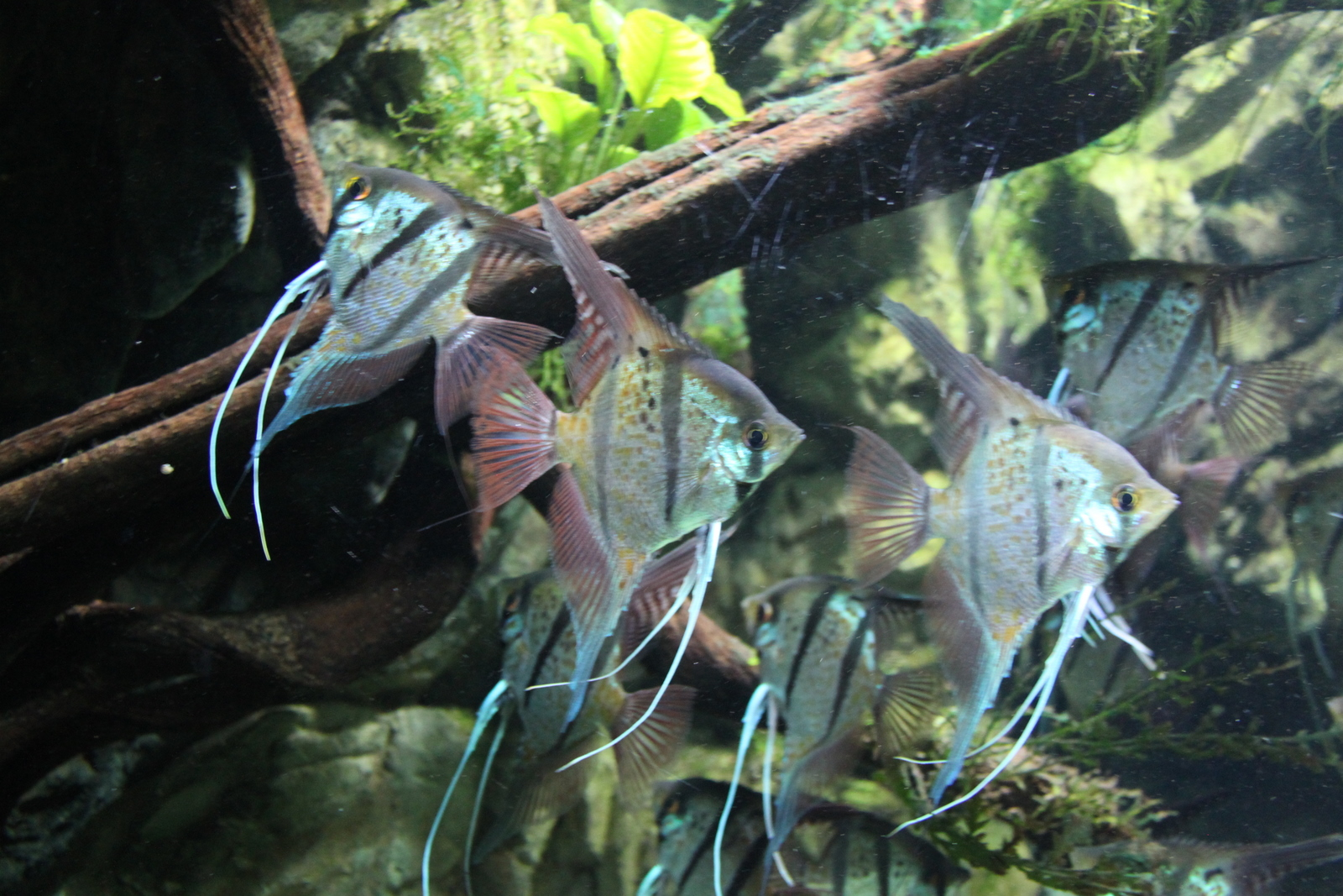 Sea Life Blankenberge